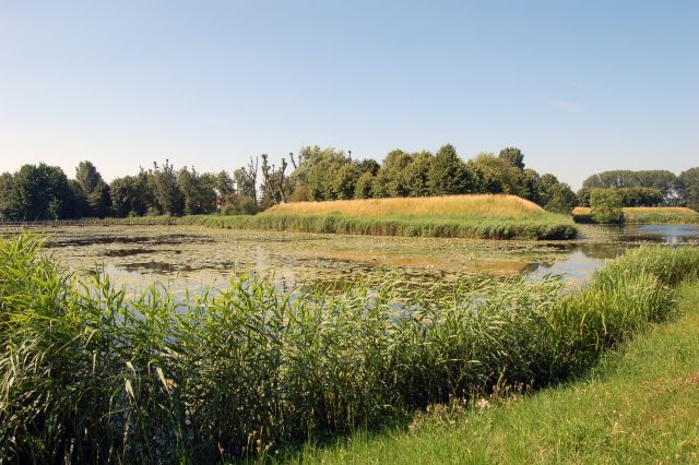 Fort Wierickerschans, Bodegraven